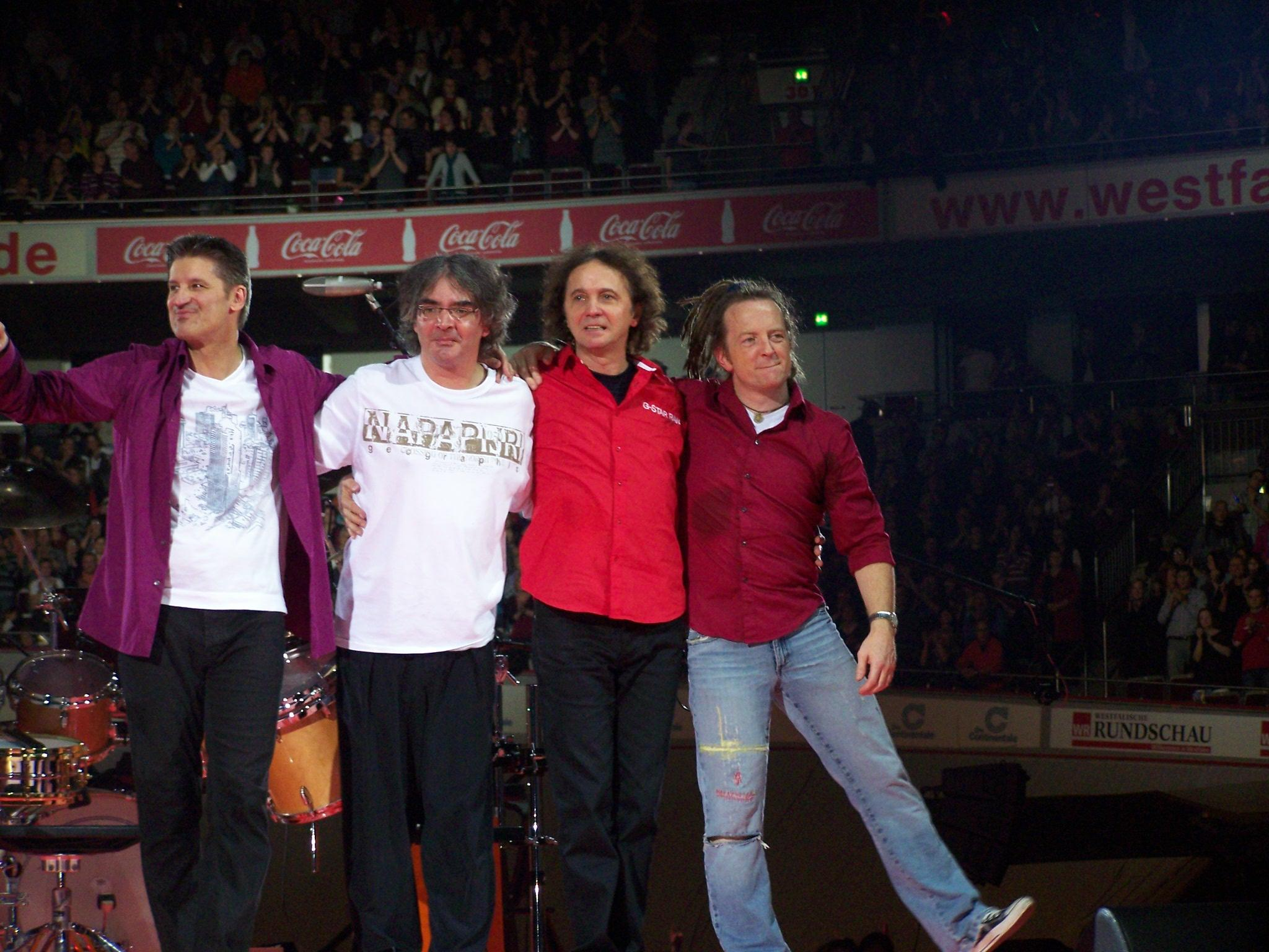 Pur während eines Konzerts in Dortmund im Dezember 2009